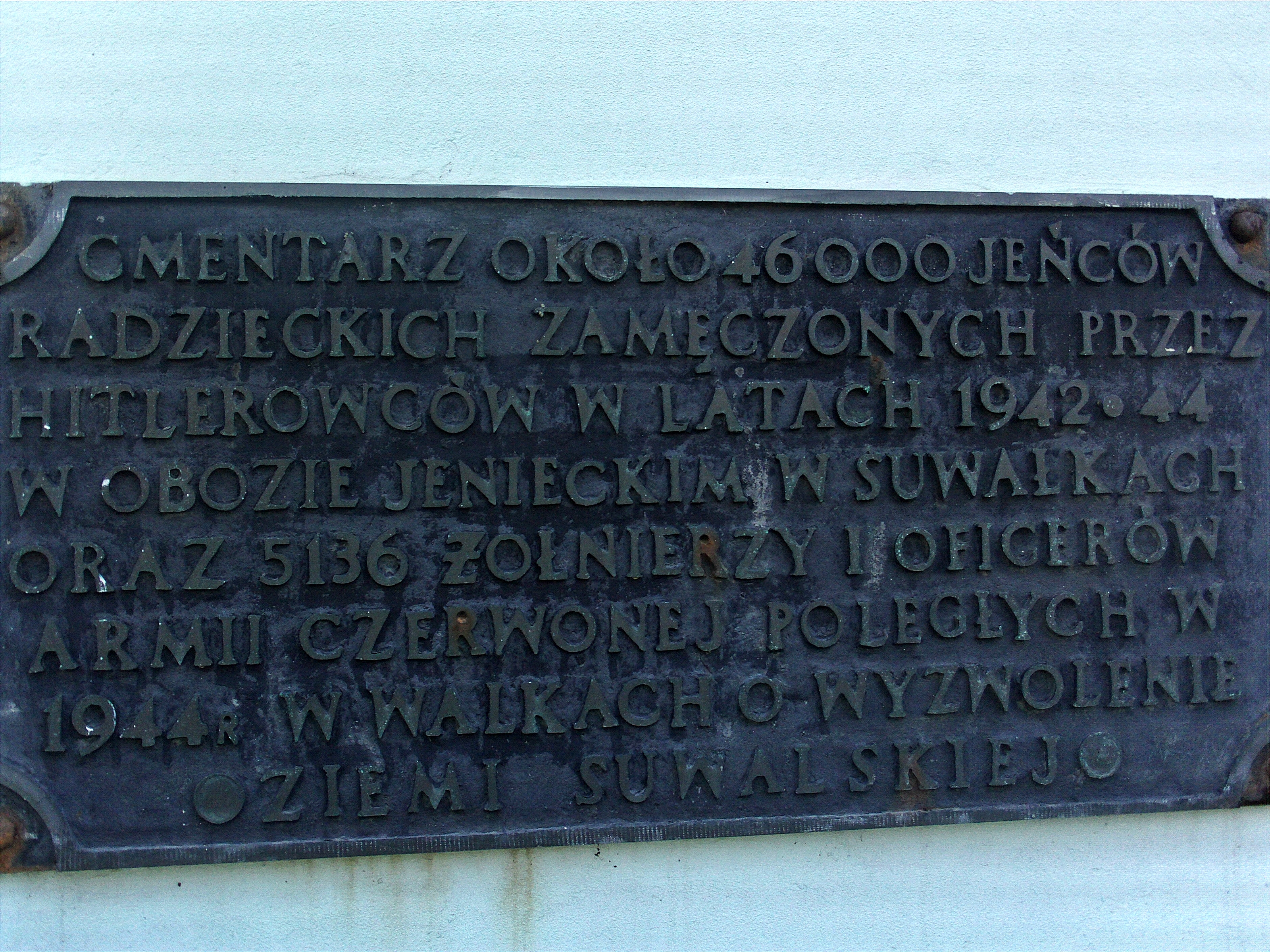 Suwałki - Cmentarz Żołnierzy Radzieckich w Suwałkach. Tablica pamiątkowa na bramie wejściowej (zabytek nr A-832 z 26.08.1991)